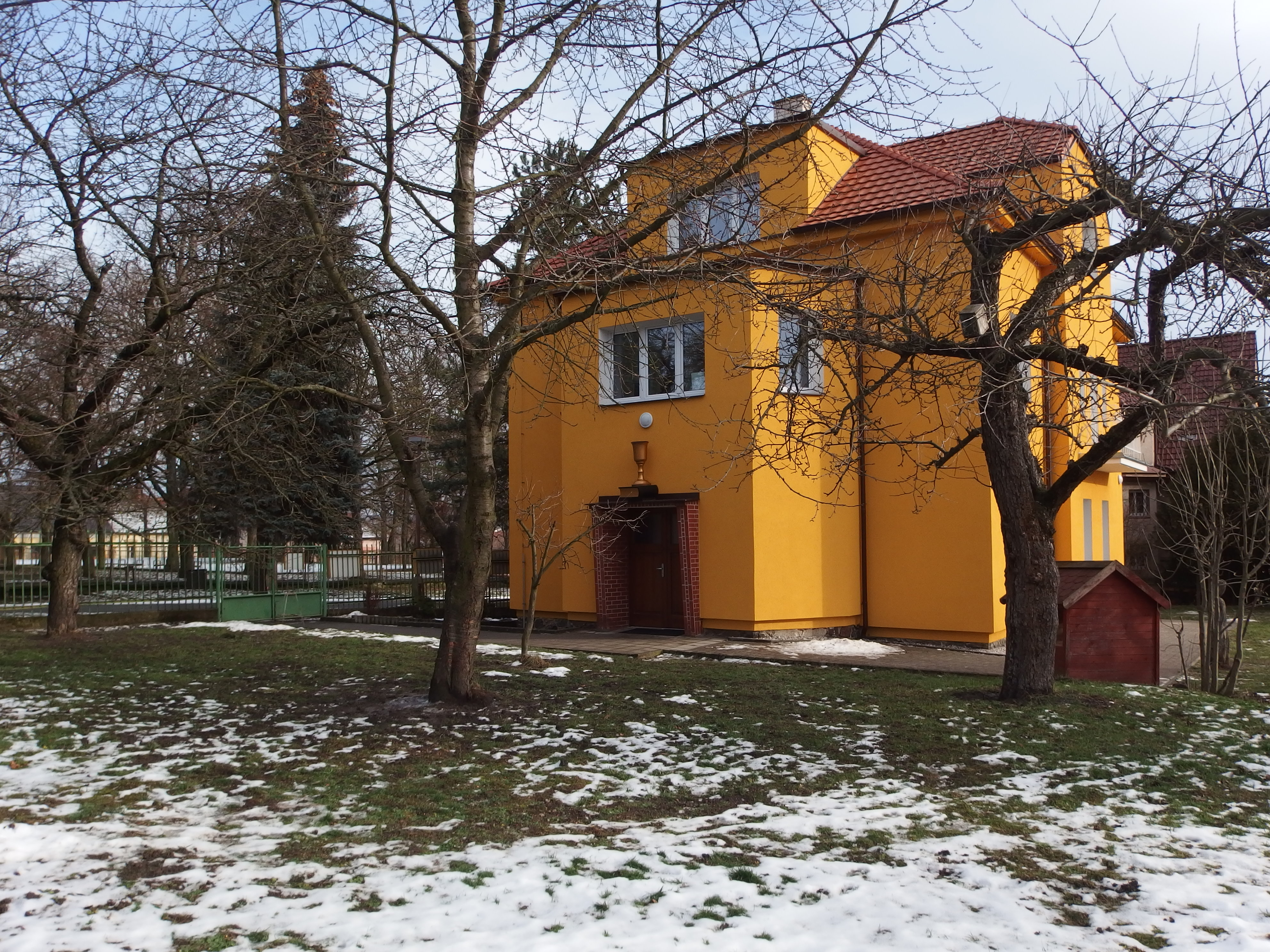 Farní sbor Českobratrské církve evangelické v Přešticích, Rebcova 557.